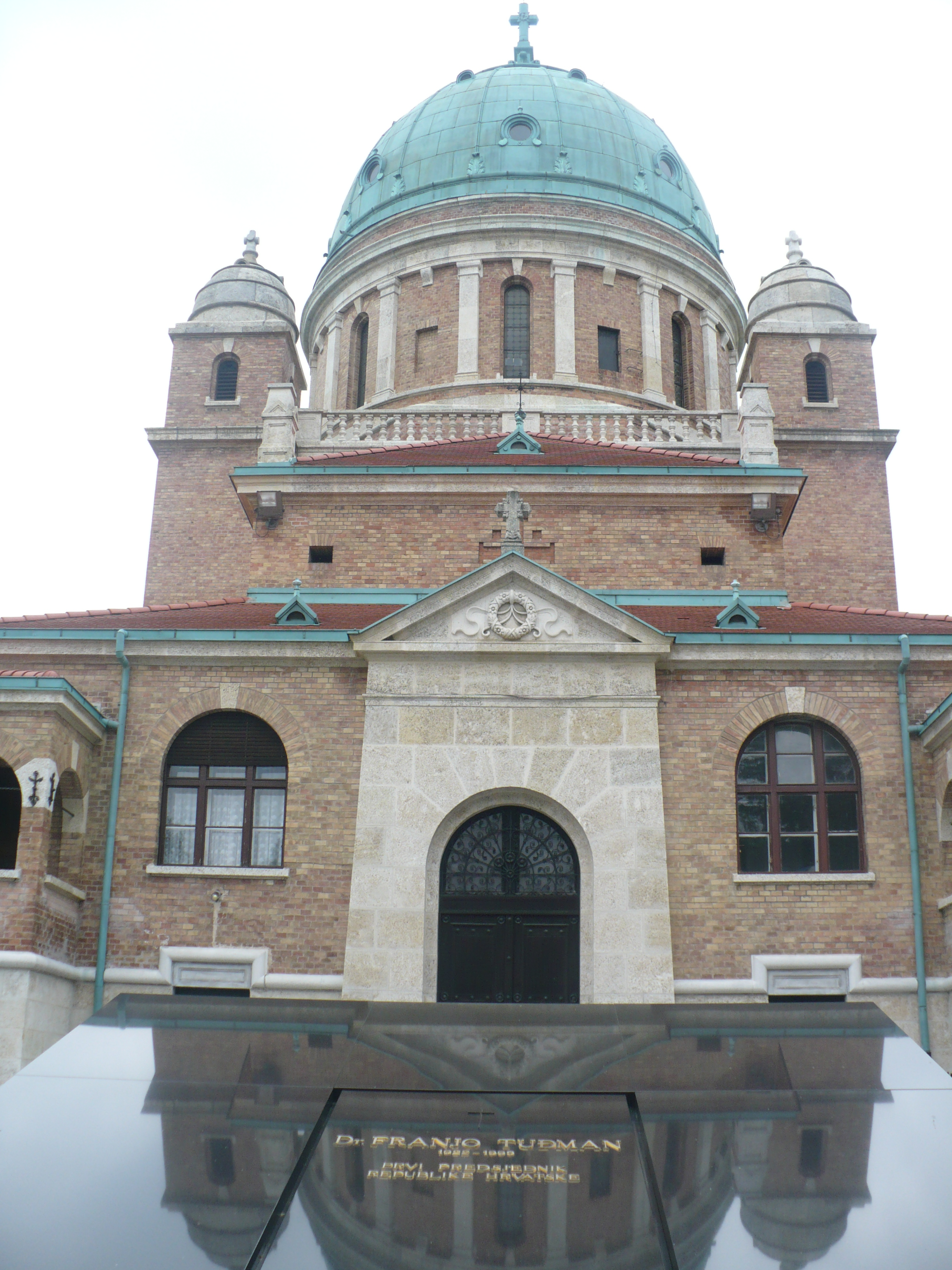 Zagreb, Hırvatistan